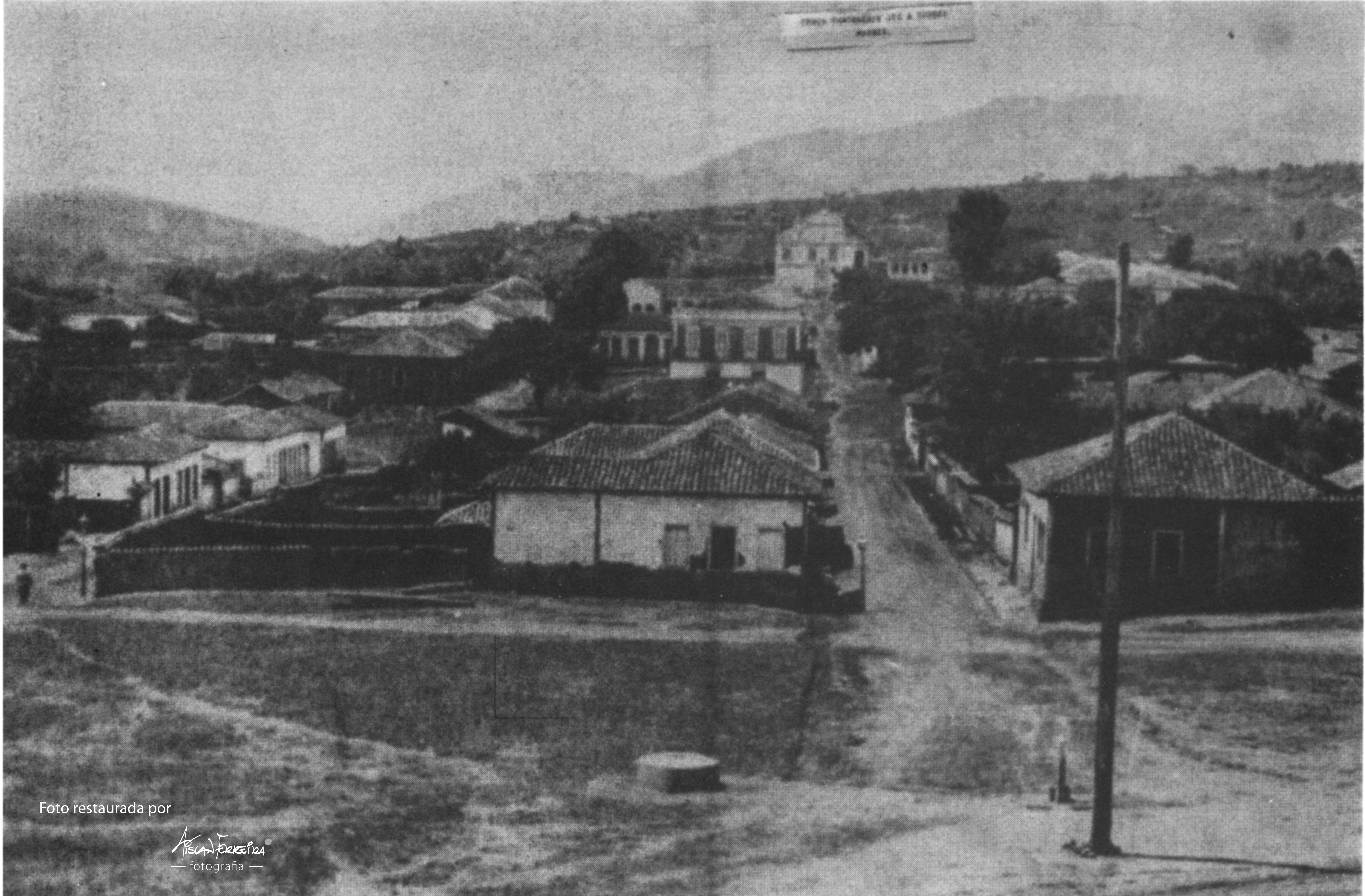 Vista da cidade de Paraisópolis no início do sec. XX. A vista possivelmente era da torre da Igreja do Rosário, demolida em 1912.